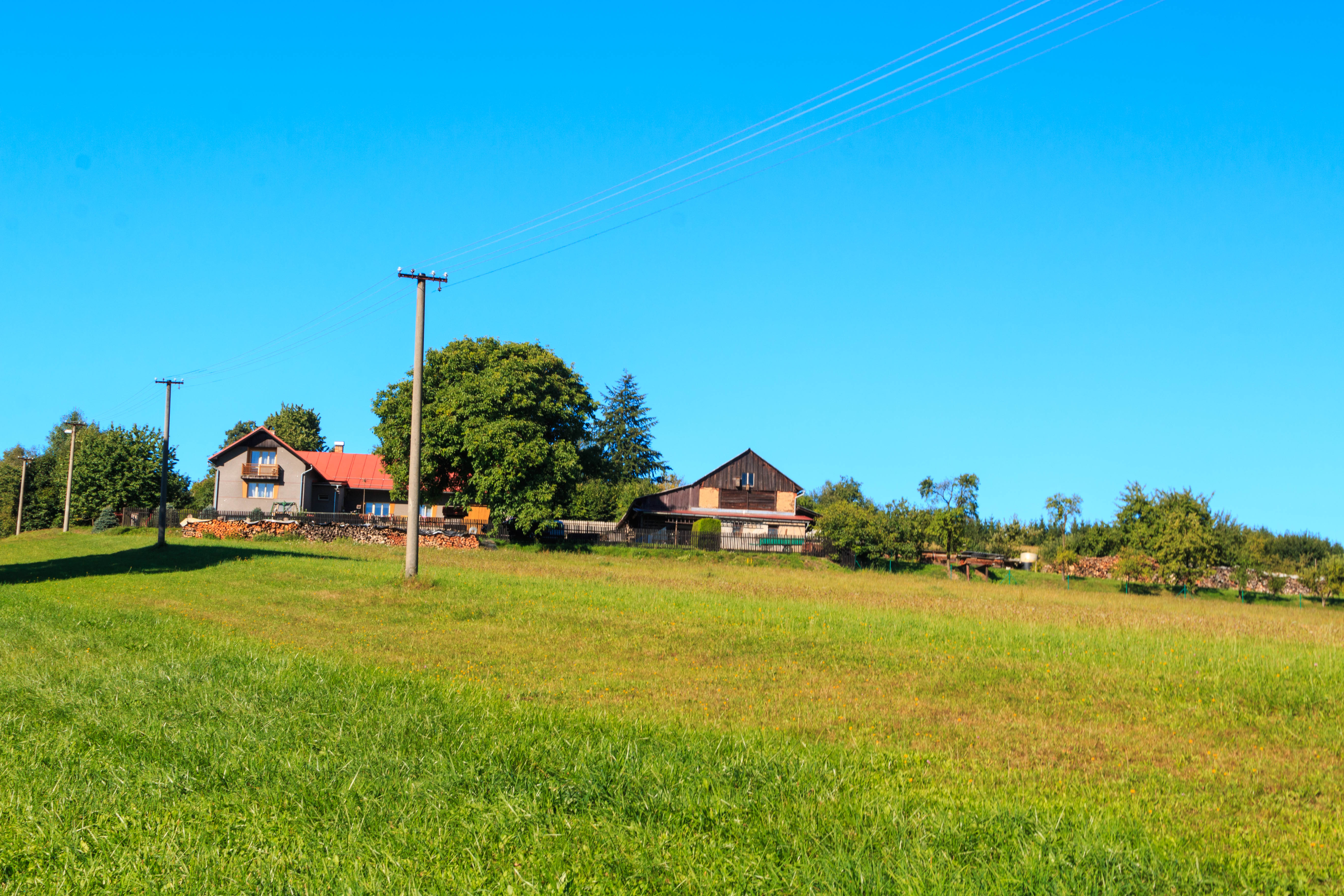 Sychrov u Kozlova